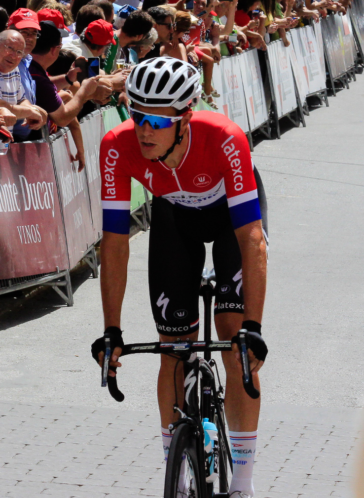 Vuelta a España 2015 | 8ª Etapa Puebla de Don Fadrique - Murcia-42